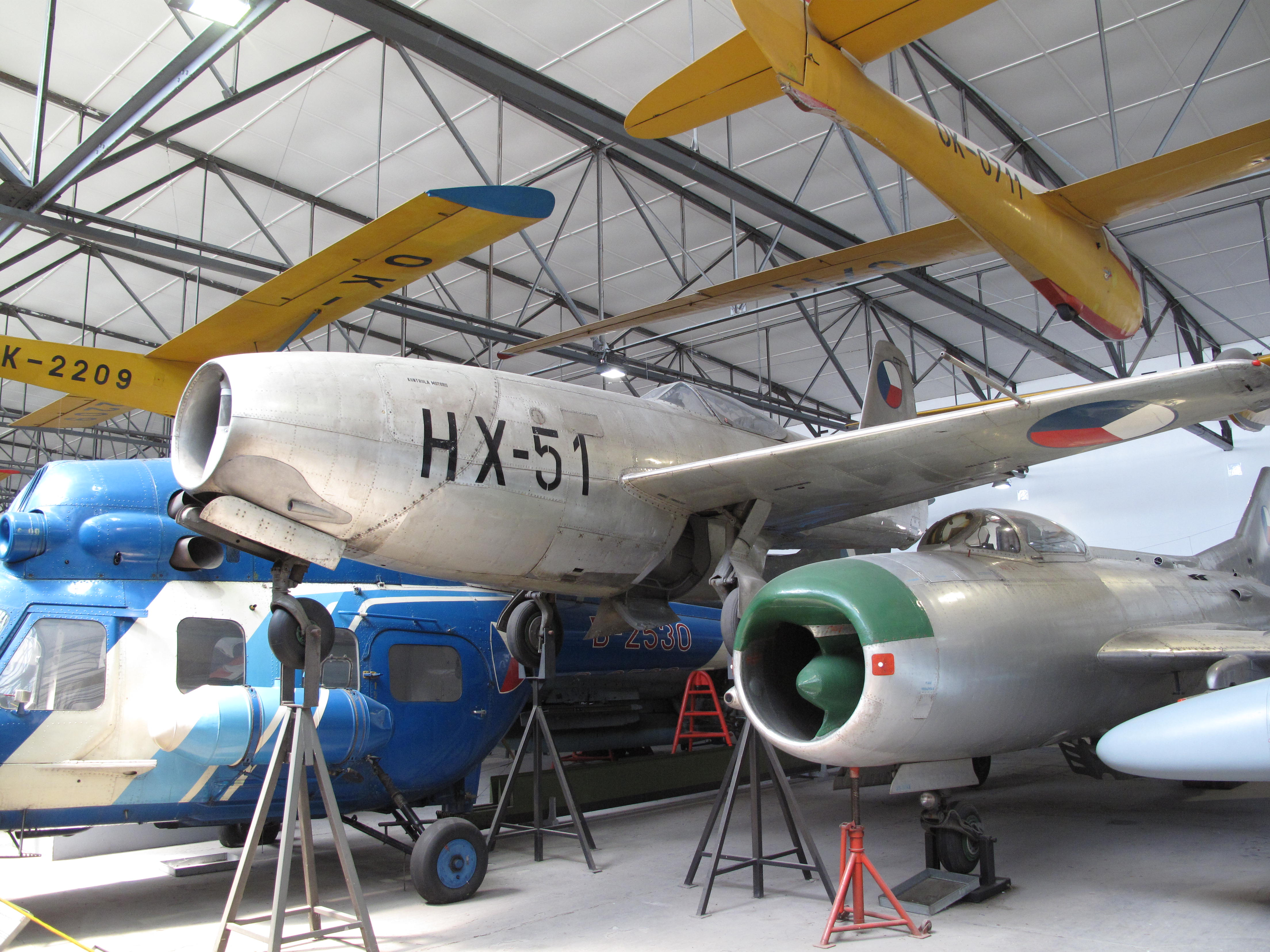 Letecké muzeum Kbely